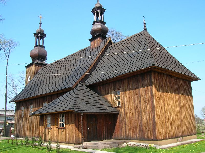 Drewniany kościółek w Mileszkach.